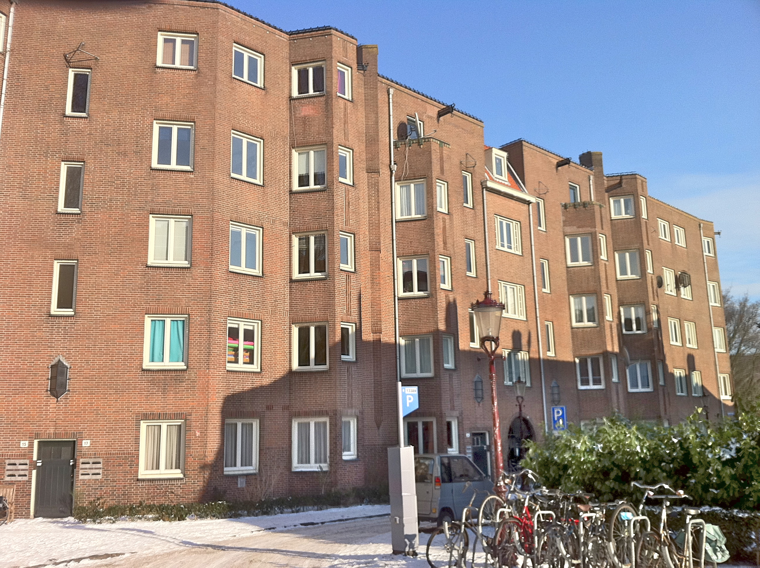 Amsterdam-Zuid. Bouwblok van 96 etagewoningen, gebouwd door Bouwvereeniging Rochdale, blok f fase 1, Des Presstraat 7, Amsterdam